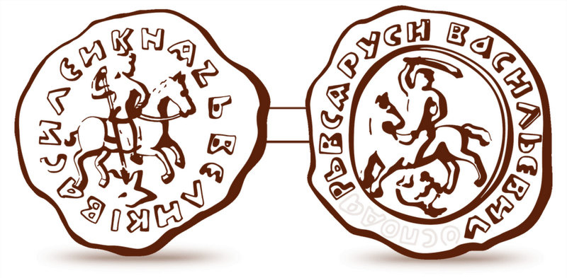 Монета великого князя Василия Васильевича (Тёмного), внука Дмитрия Донского. Середина XV века. Лицевая и оборотная стороны. Прорись по А.Б. Лакиеру.